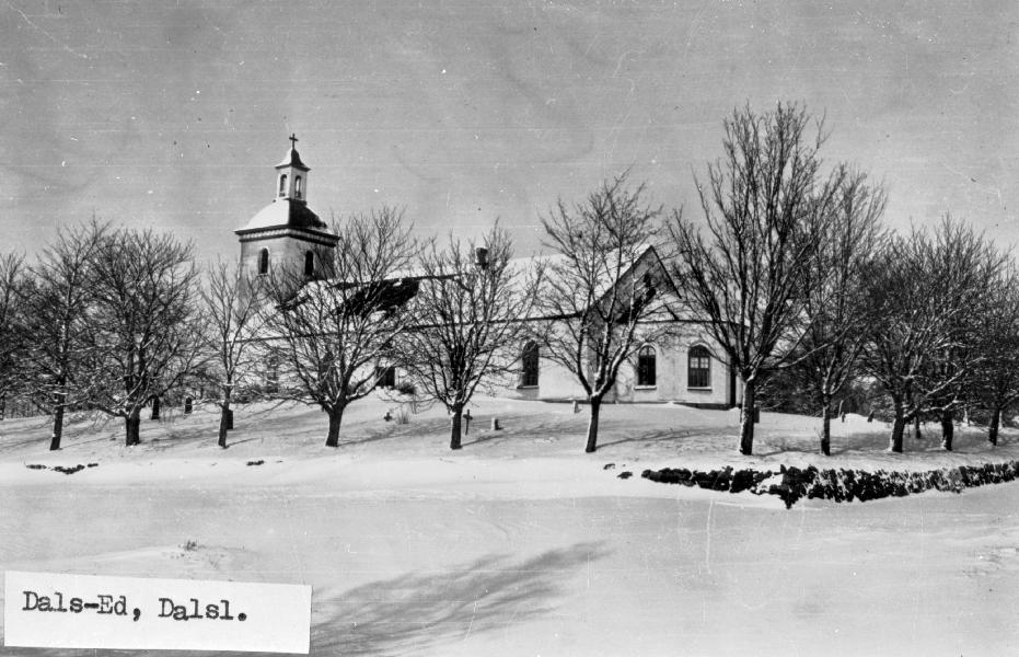 Kyrkan från sydöst.